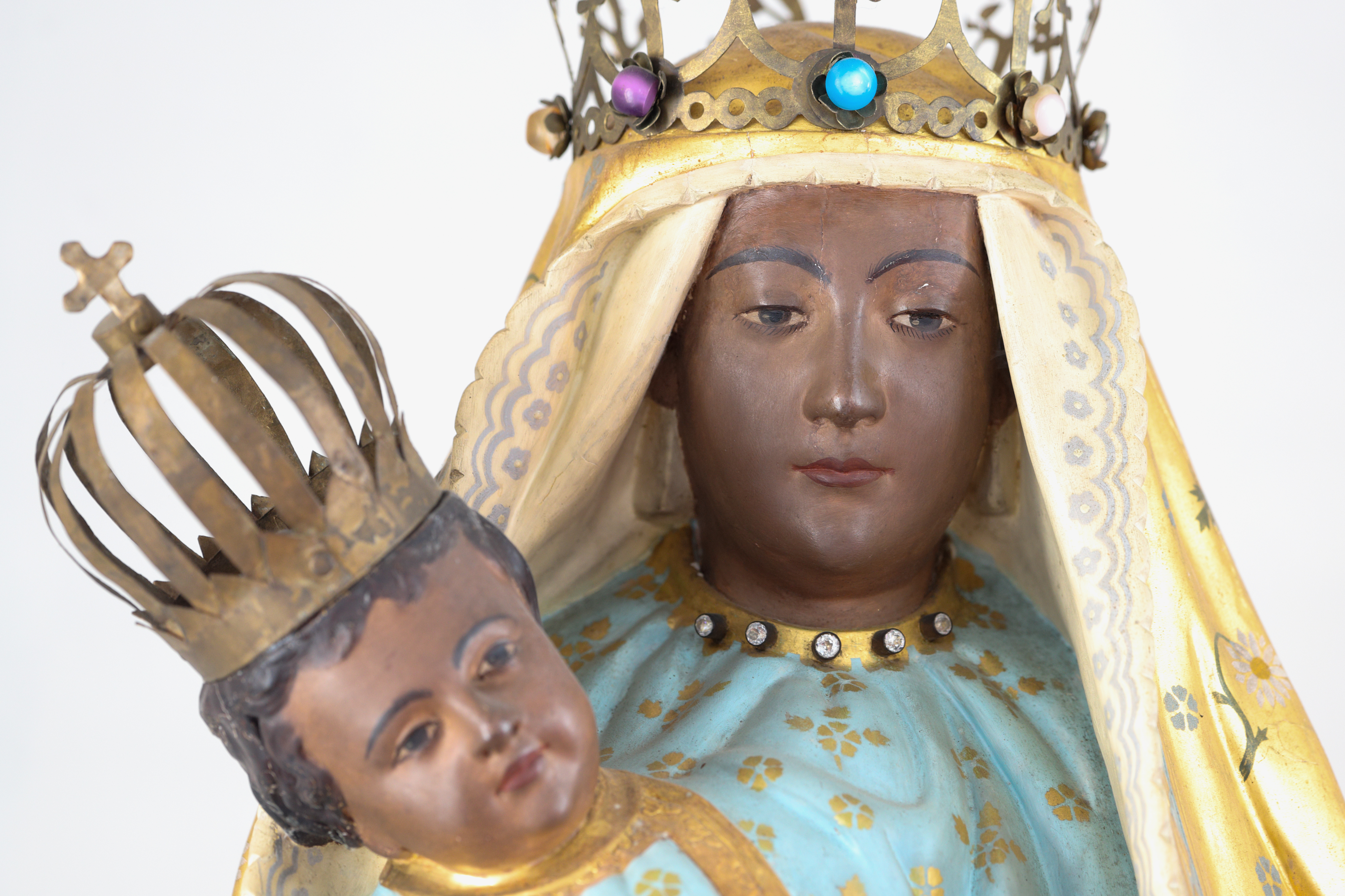 山形県鶴岡市にある鶴岡カトリック教会天主堂に安置された、日本国内では唯一の黒い聖母像。